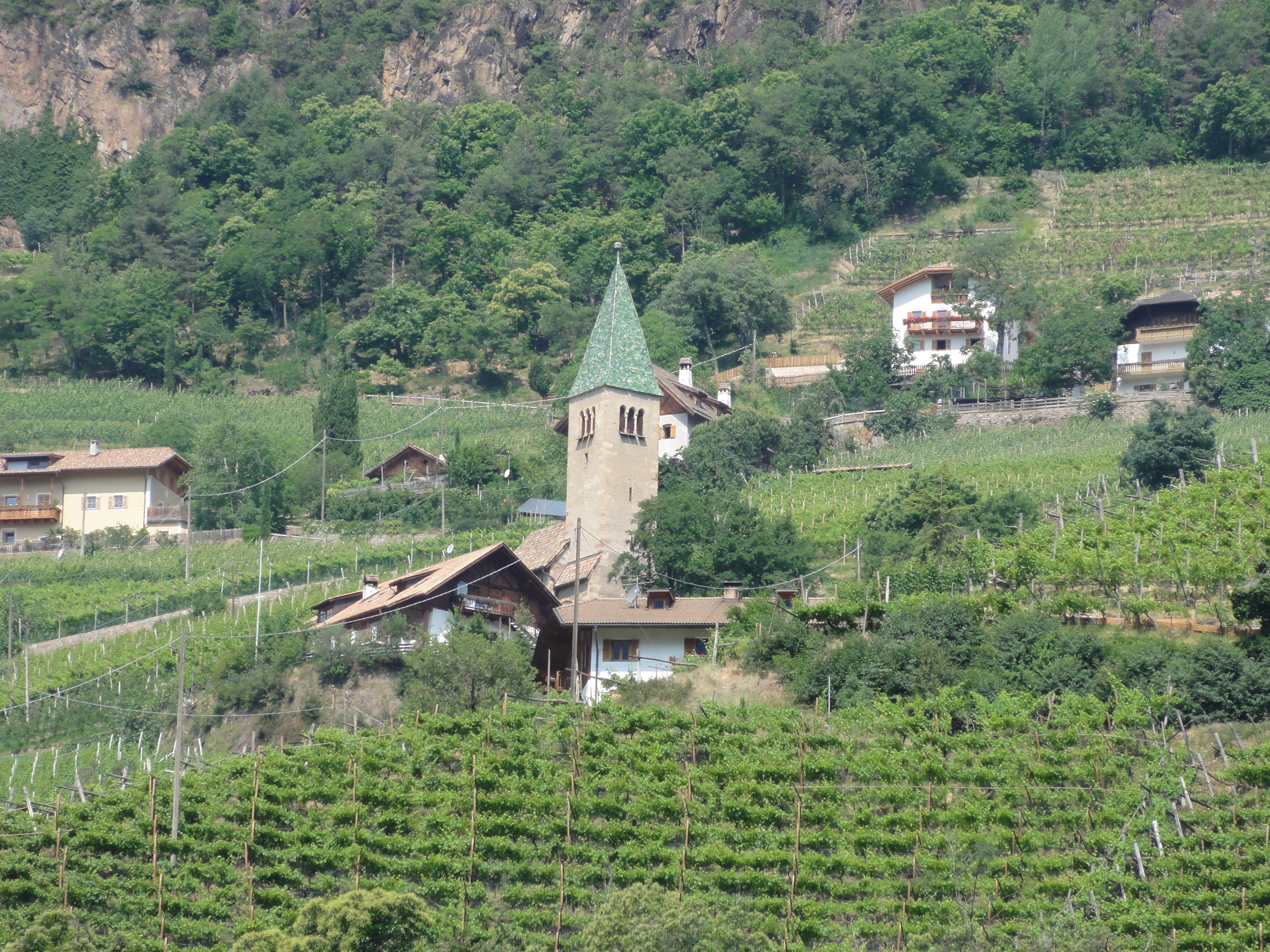 St. Jakob am Sand bei Bozen, Südtirol